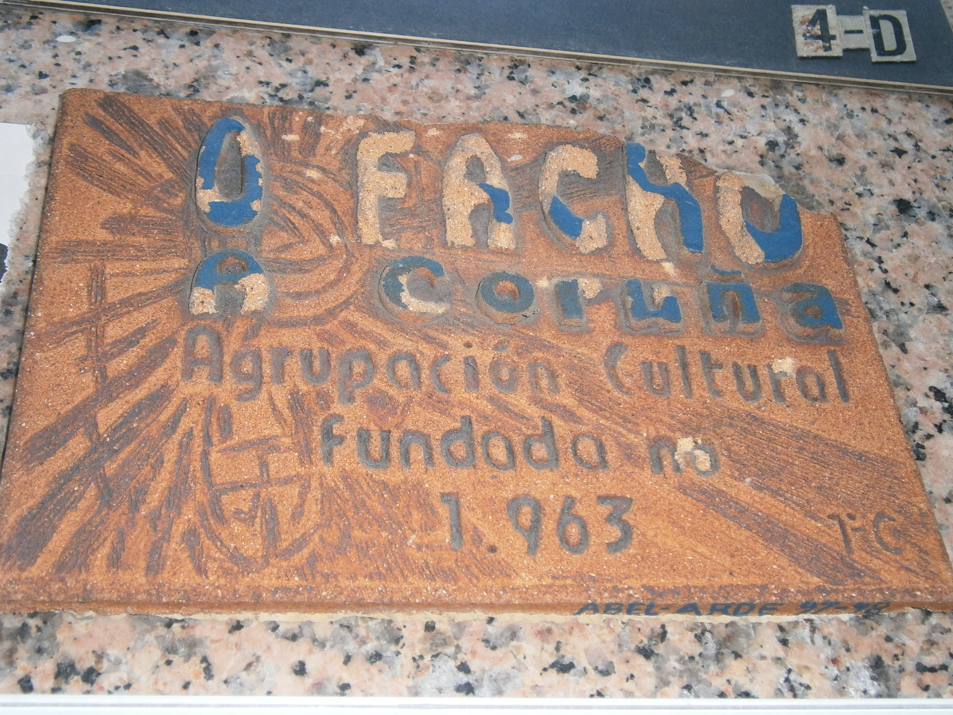 Placa na sede da Agrupación Cultural O Facho na Coruña